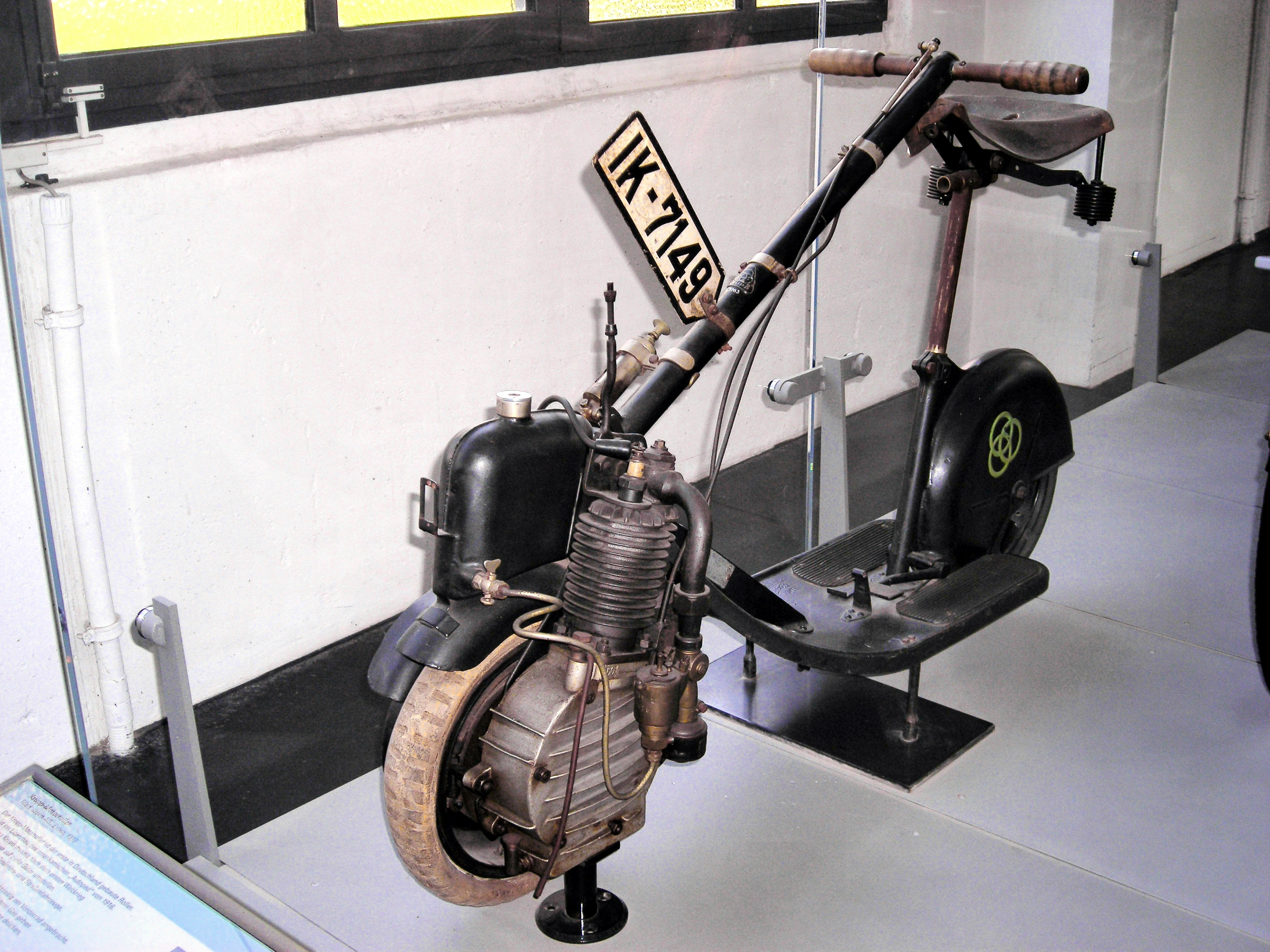 Krupp-Motorroller, Hersteller: Friedrich Krupp AG, Produktionszeitraum: 1919 bis 1922; dies war der erste serienmässig produzierte Motorroller in Deutschland. Technische Daten: Viertakt-Einzylinder-Verbrennungsmotor, 191 cm³ Hubraum, 1,3 kW (1,75 PS) Leistung, 35 km/h bauartbedingte Höchstgeschwindigkeit, 59,5 kg Leergewicht). Exponat im Deutschen Museum Verkehrszentrum, Halle III (Inv.-Nr. 68783)